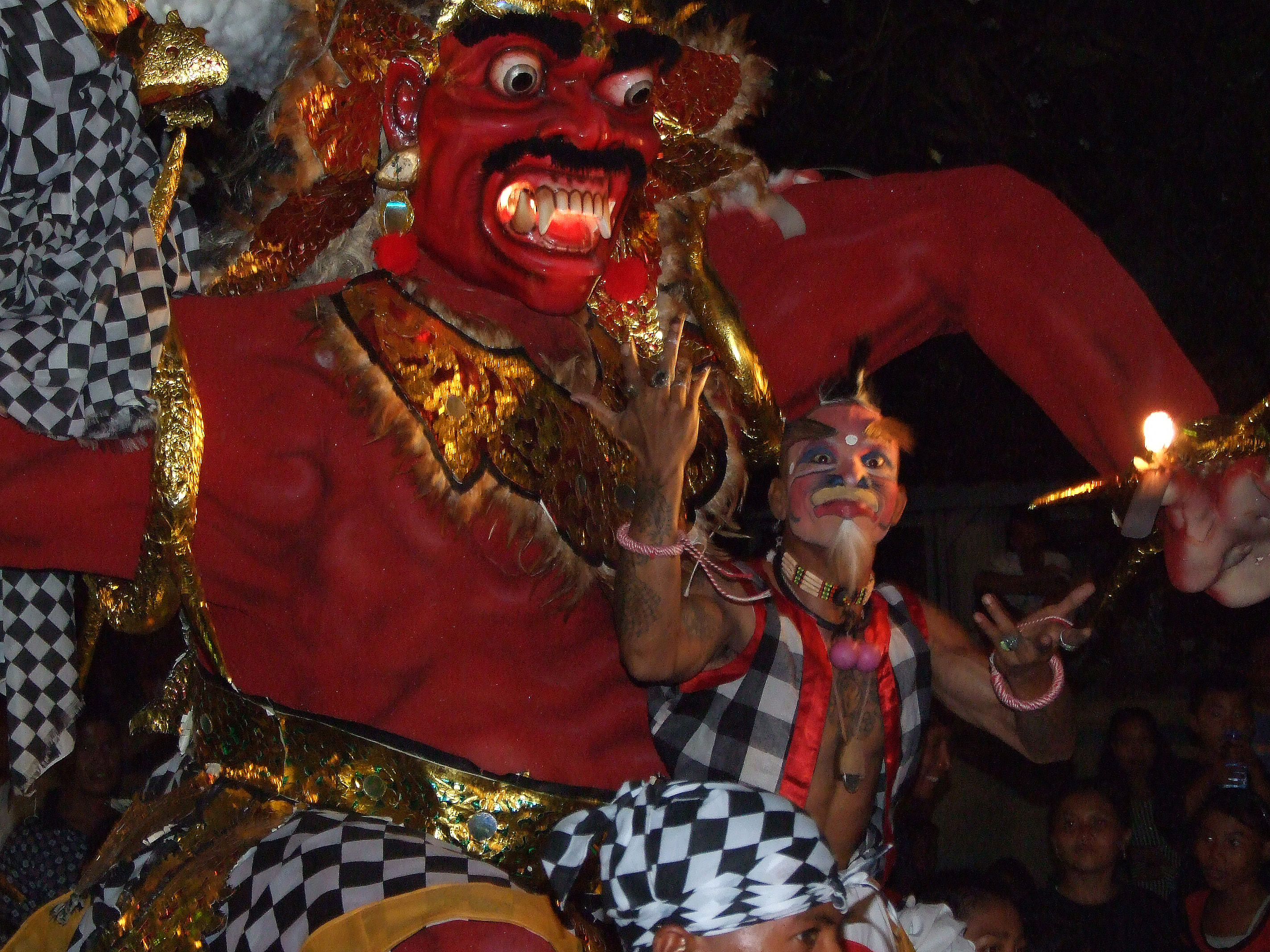 Nyepi- Fest, balinesisches Neujahrsfest, Bali